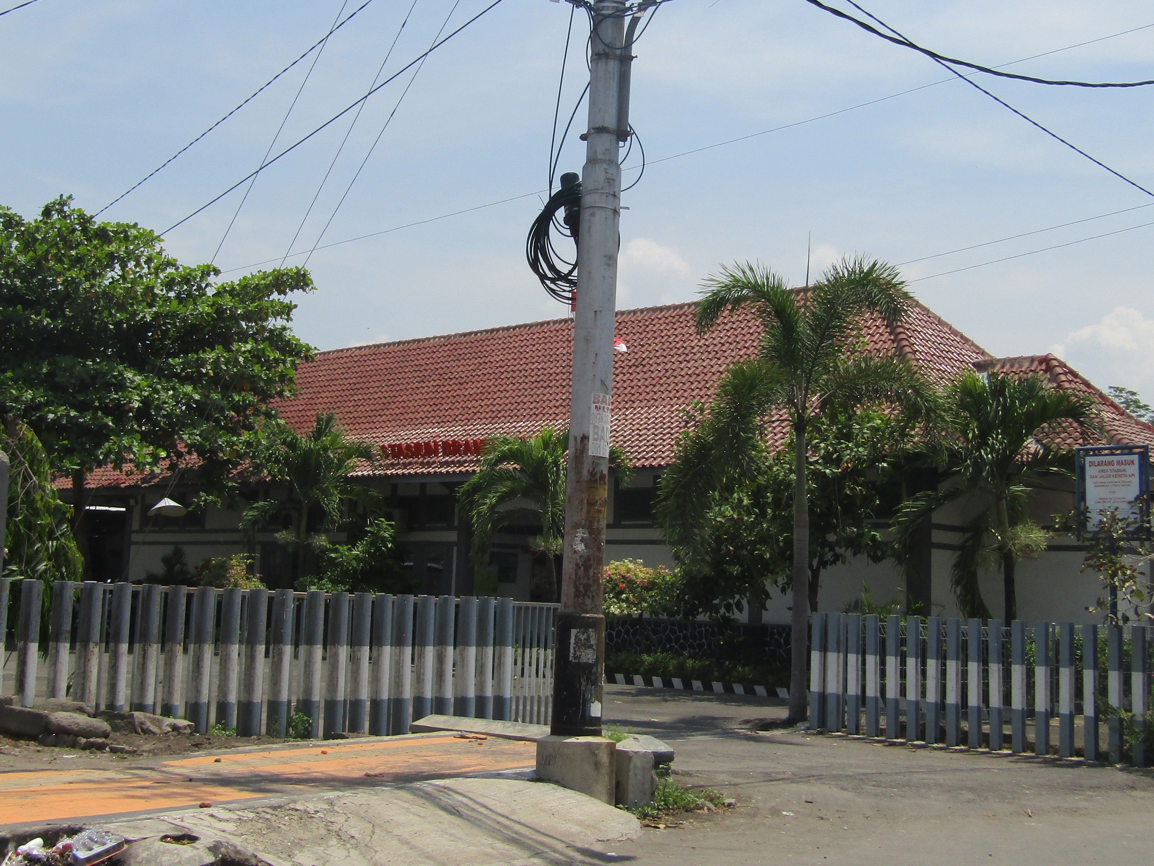 Stasiun Brambanan, 2019